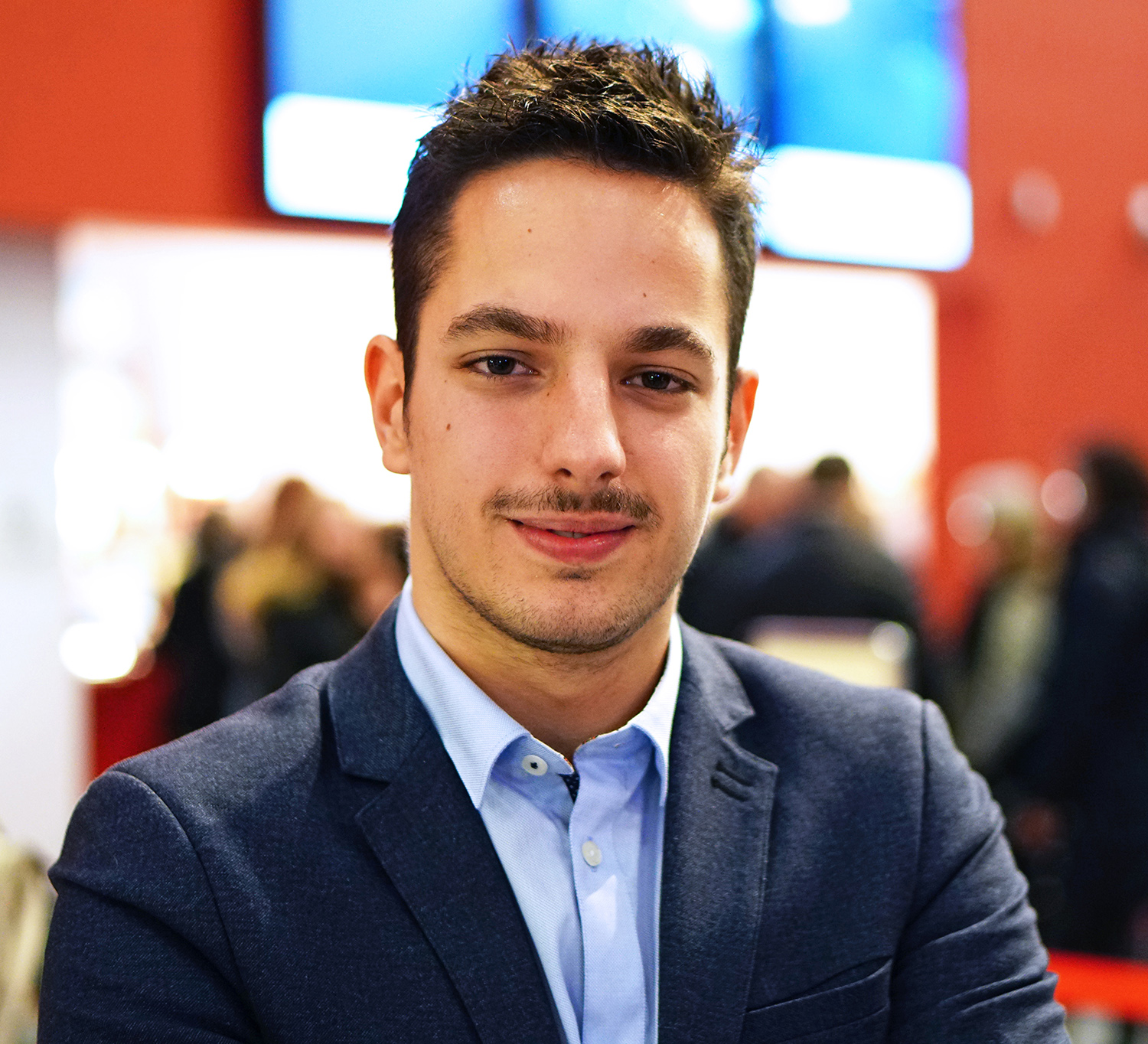 Le réalisateur Léo Pons lors de la projection du film "CHUT!" à Aurillac le 24 novembre 2016.